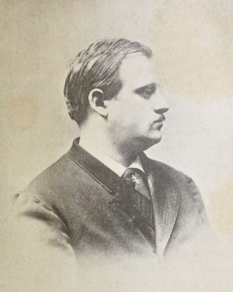 Stanislas de Guaïta, dans ses dernières années (communiqué par La Lorraine artiste). Photographie publiée dans l'ouvrage de Maurice Barrès, Un rénovateur de l'occultisme. Stanislas de Guaita (1861-1898), Paris, Chamuel, 1898 [1].